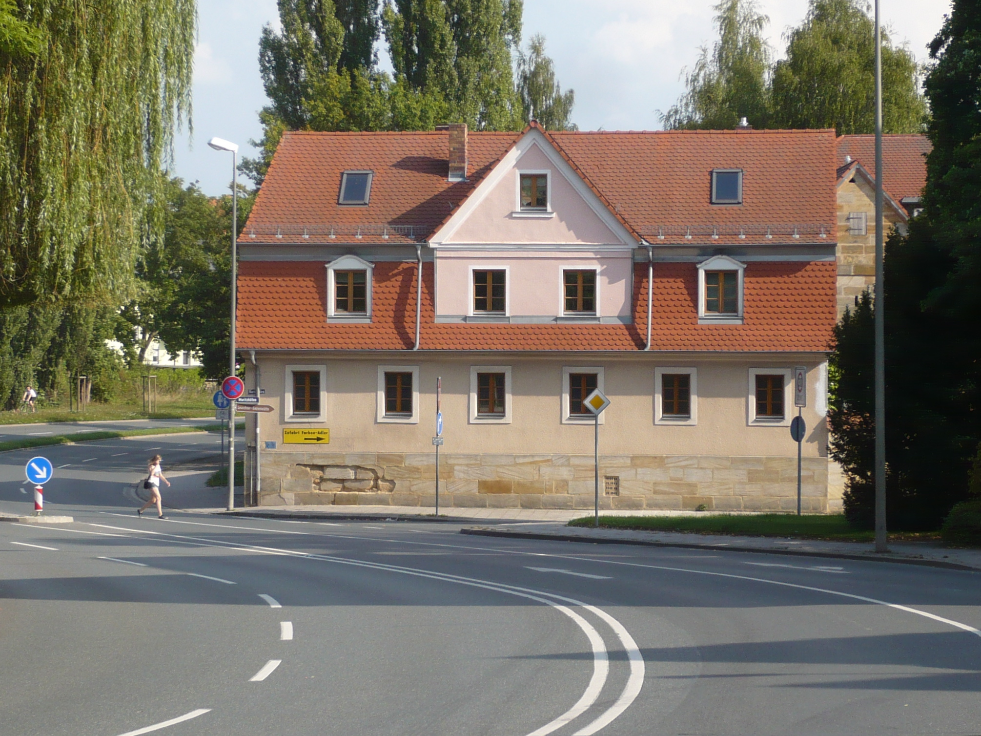 Moritzhöfen 17 Bayreuth